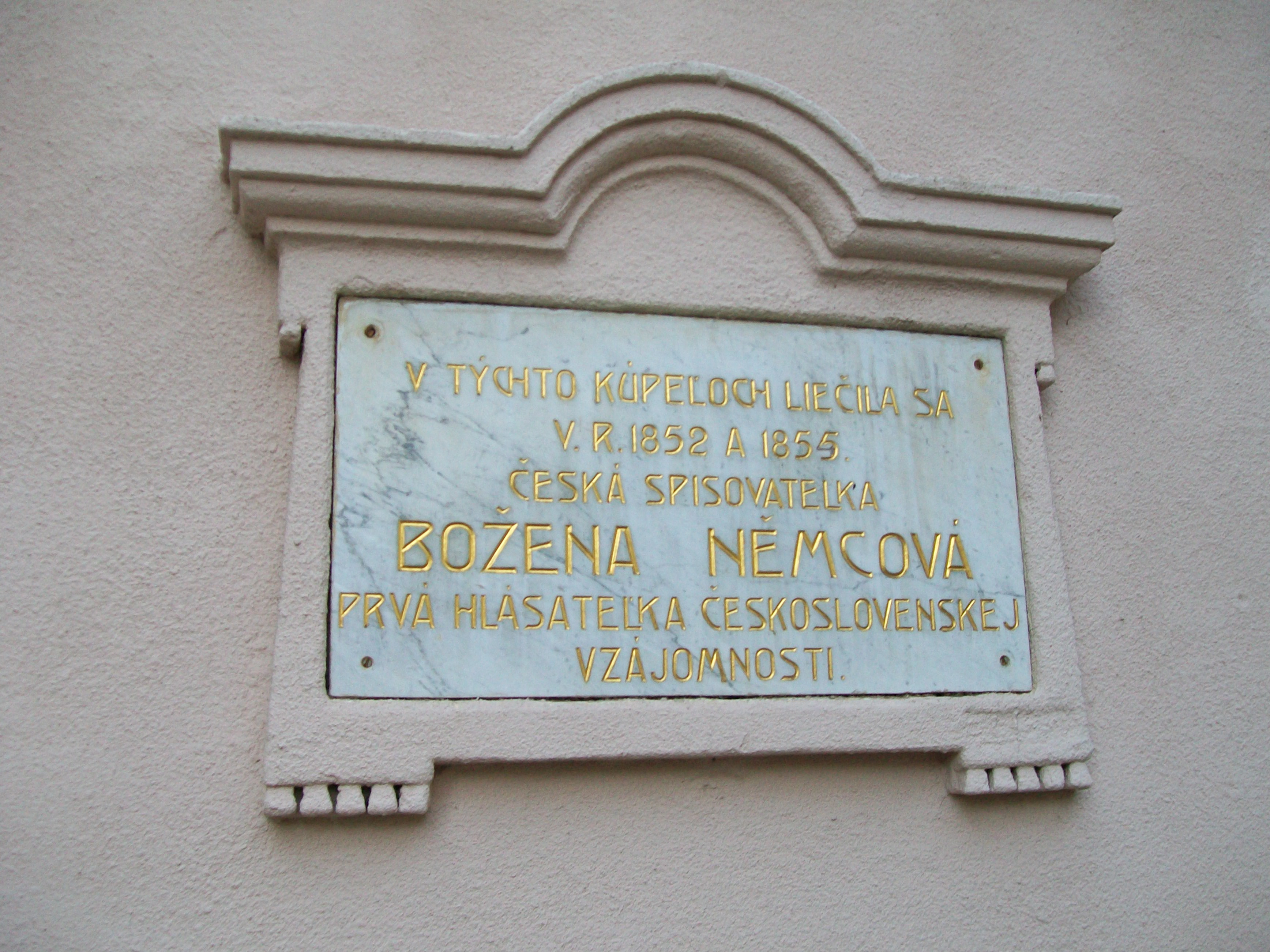 Pamätná tabuľa Boženy Němcovej v kúpeľoch Sliač.